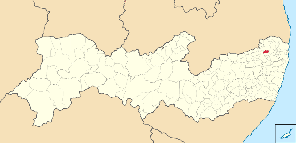 Mapa de Buenos Aires (2)